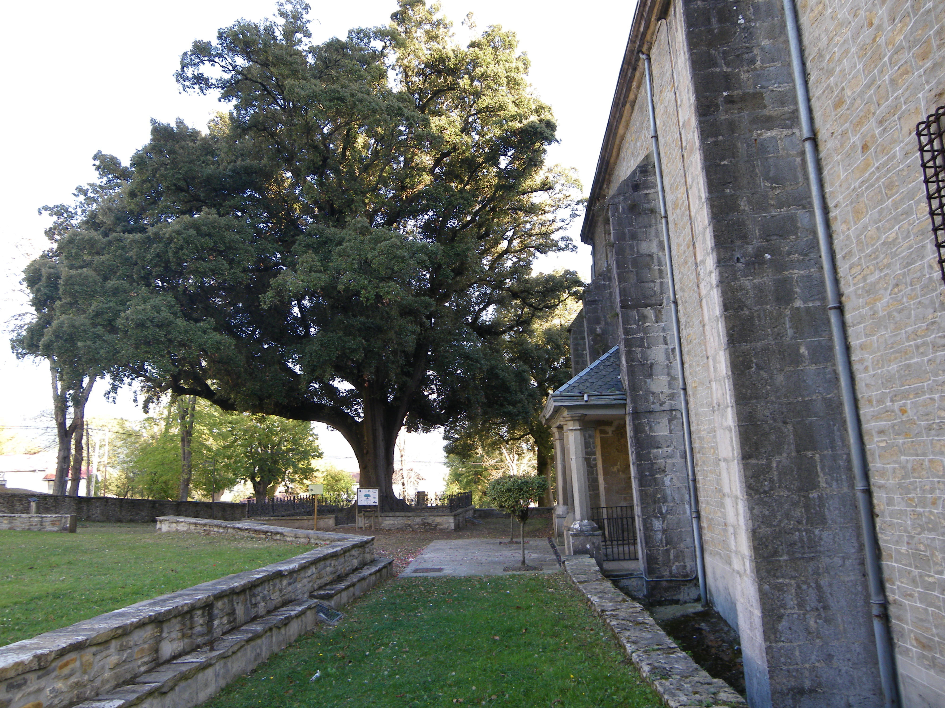 Artziniegako arte zaharra, Artziniega, Araba.